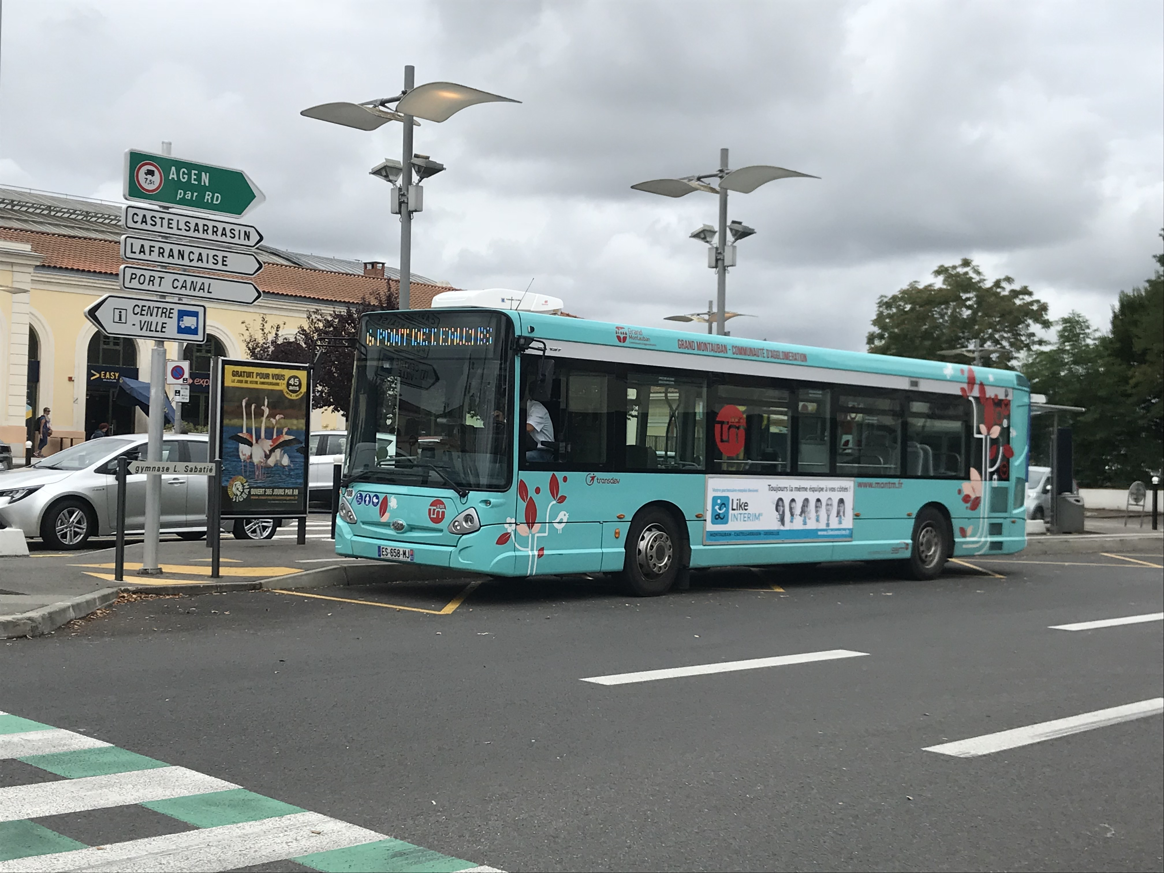 Bus ligne 6 de Montauban